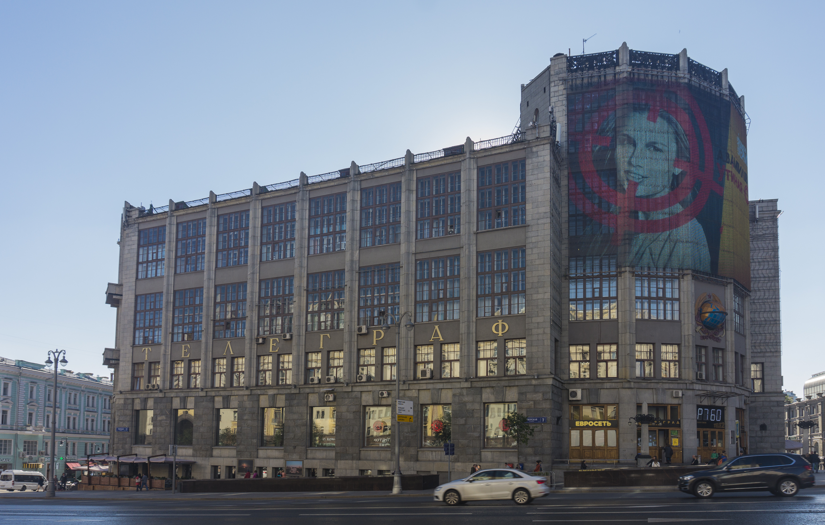 Здание Центрального телеграфа: Тверская ул., дом 7, Тверской, Центральный округ, Москва